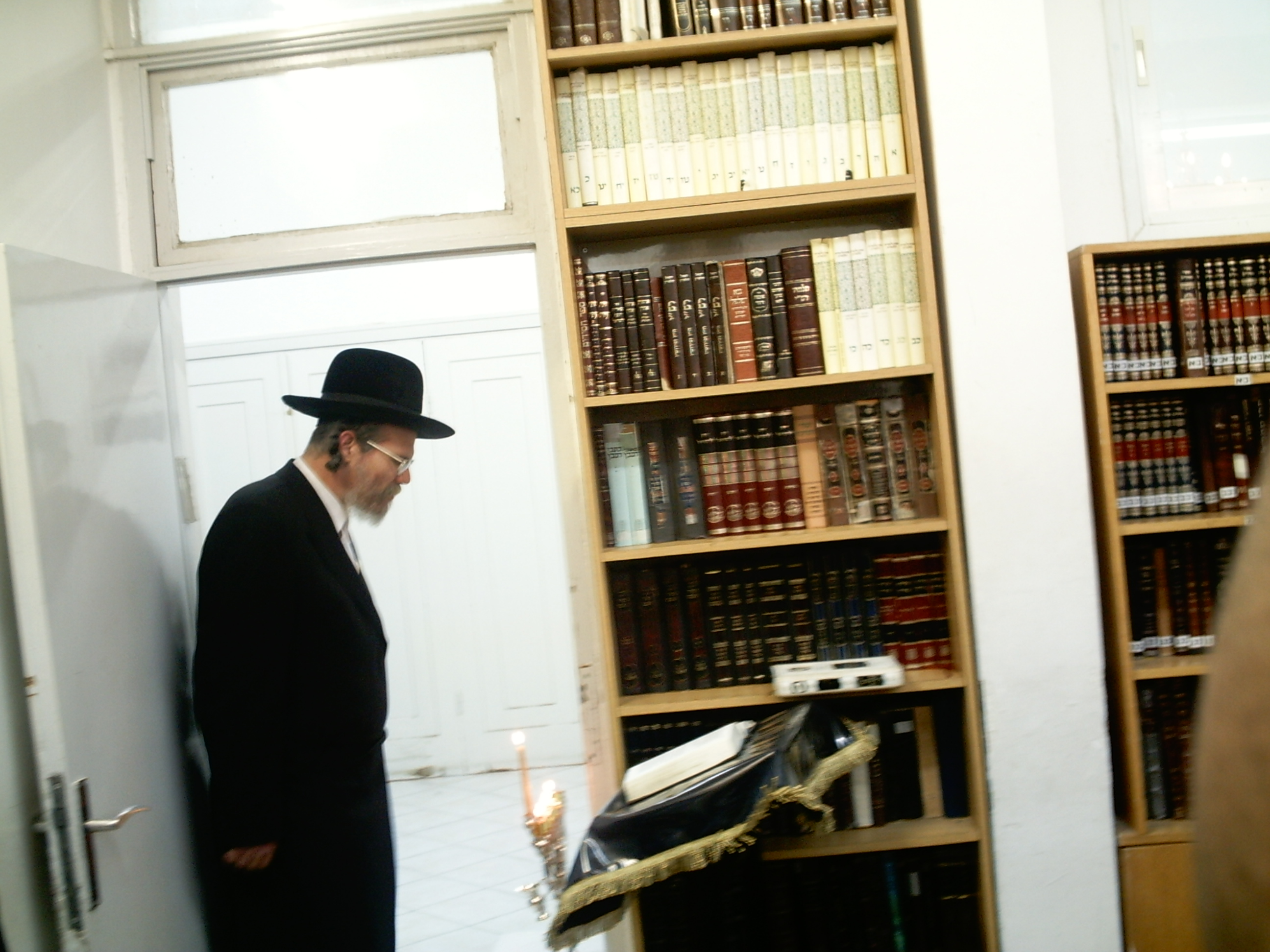 האדמו"ר רבי שמואל יצחק בורנשטיין שליט"א מסוכטשוב